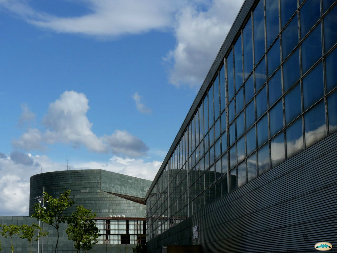 Pontevedra-Auditorio y Pazo de exposiciones